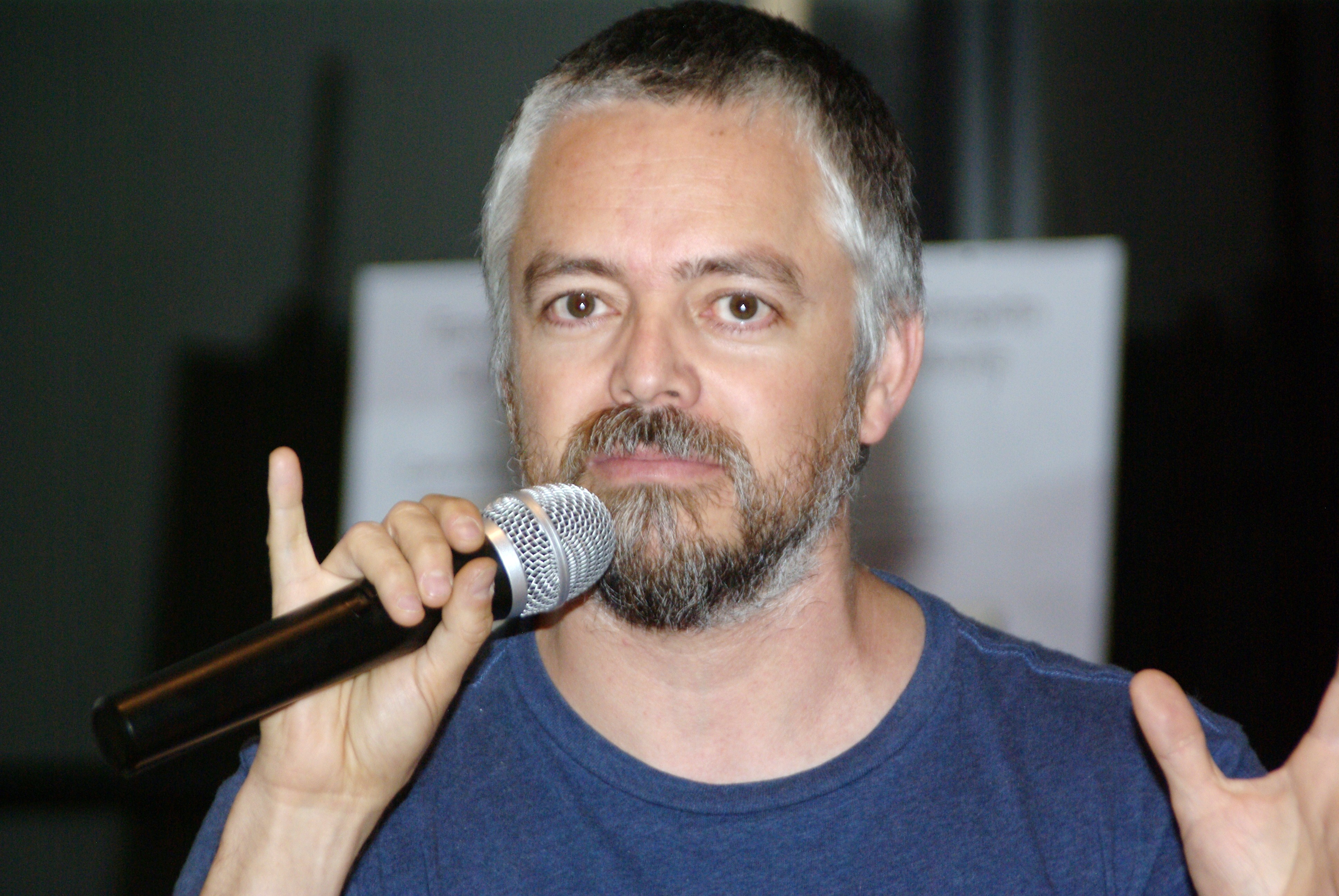 El escritor Jorge Baradit en la presentación del libro de Macarena Areco Cartografía de la novela chilena reciente: realismos, experimentalismos, hibridaciones y subgéneros, realizada en el Centro Cultural Gabriela Mistral el 2 de abril de 2015